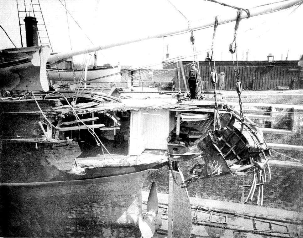 Забияка после столкновения с английским пароходом Лорд Байрон, Лондон, 1879 год